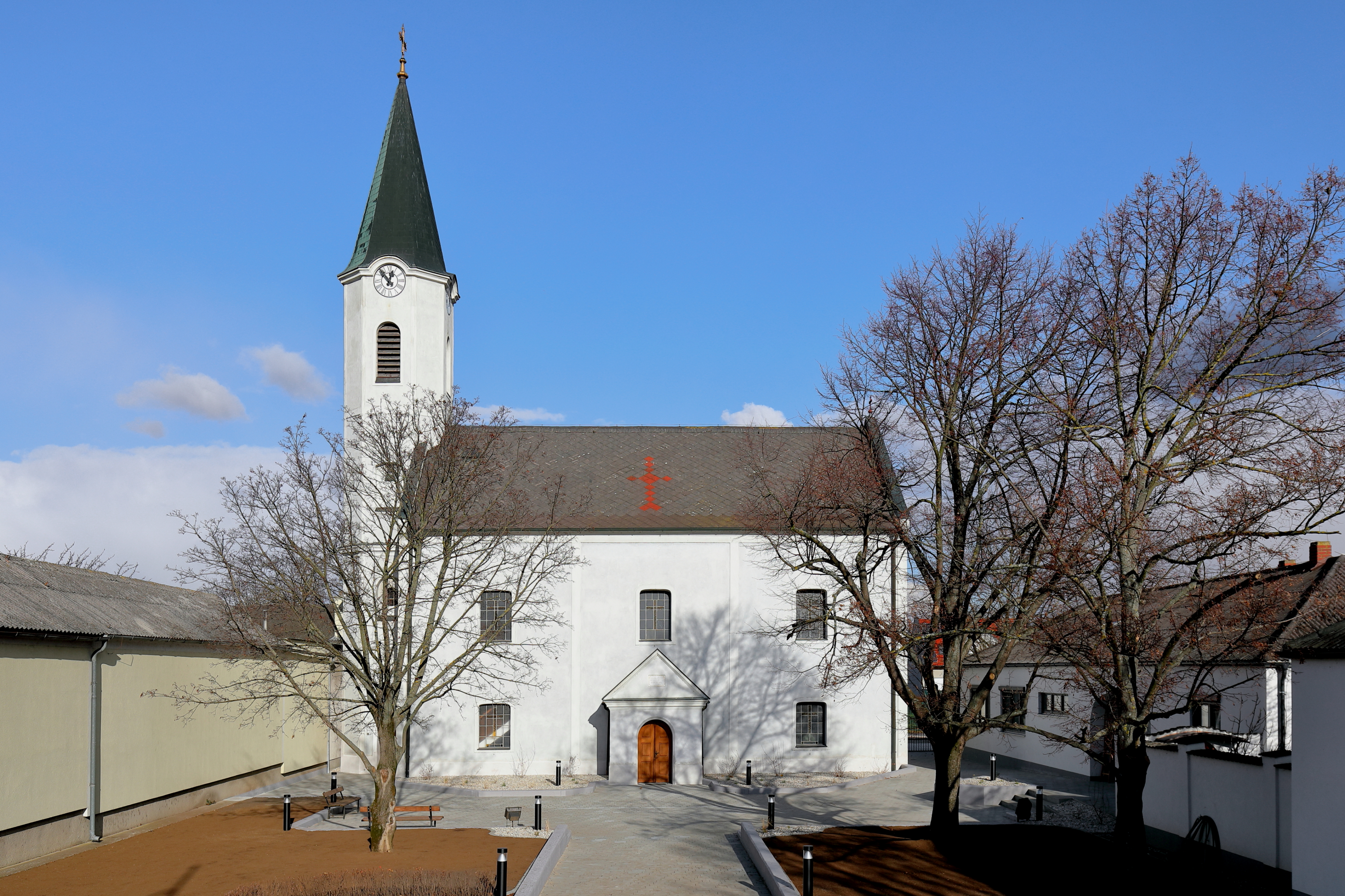 Südwestansicht der evangelischen Pfarrkirche in der burgenländischen Gemeinde Nickelsdorf.Die Kirche bzw. das Bethaus wurde 1787 errichtet und am 11. Oktober 1787 geweiht. Nachdem ab 1791 evangelische Kirchen auch einen Turm und ein Geläute haben durfte, wurde 1797 die erste Glocke angekauft und in einem Holzgerüst aufgezogen. 1823 erfolgte an der Nordwestfassade der Anbau eines achteckigen Turmes mit Glockenstube und Spitzhelm.